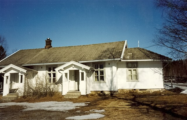 Oset kapell